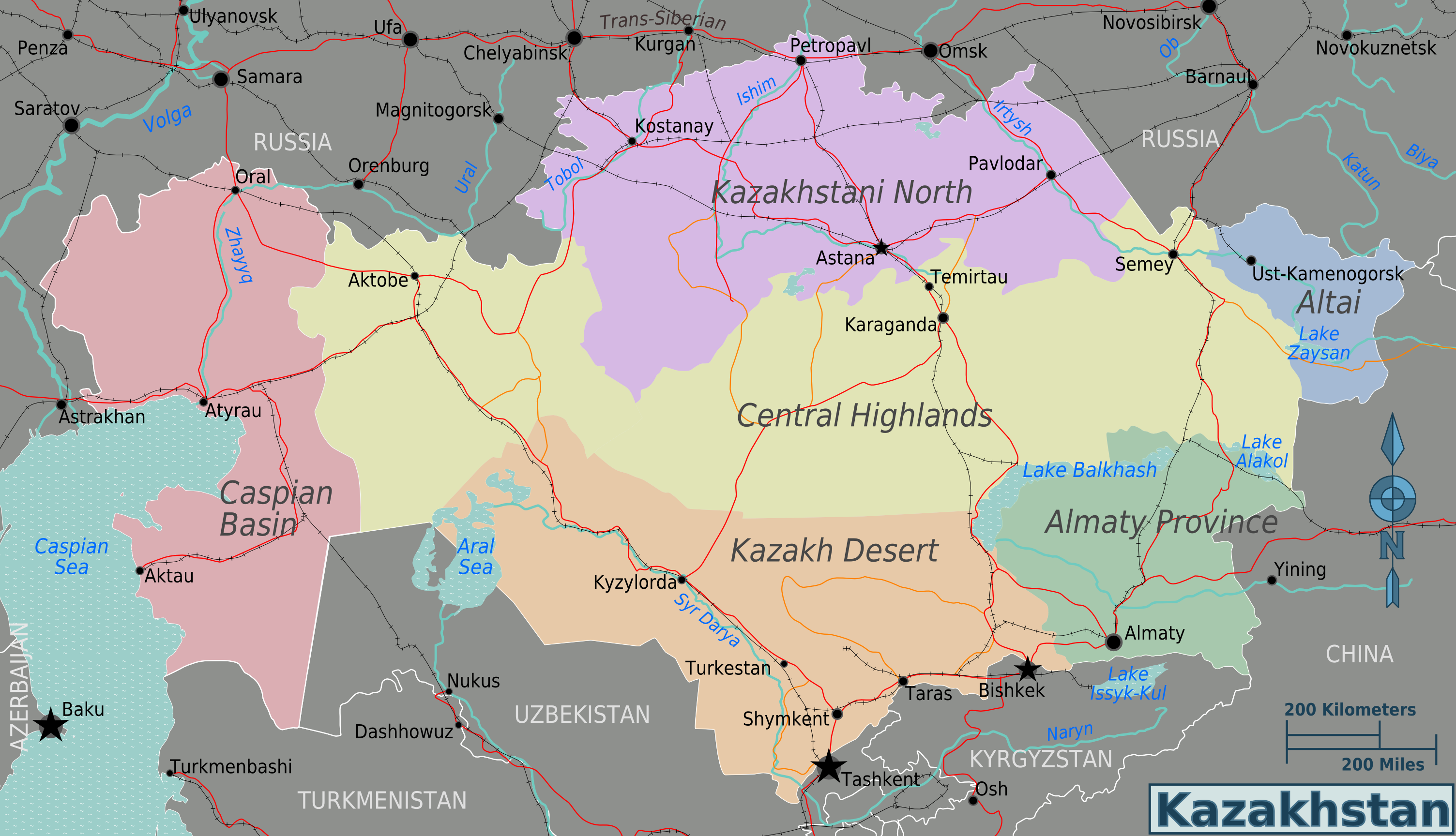 Kazakhstan regions map (Wikivoyage regional scheme), English version